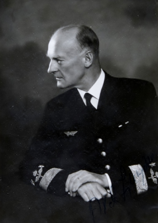 Tavla inramat fotografi med Axel Ljungdahl till Kapten Jan Andersson F 8 Barkaby. På baksidan av tavlan finns ett tackbrev ifrån dåvarande chefen för flygvapnet Axel Ljungdahl daterat Stockholm den 23 juni 1960